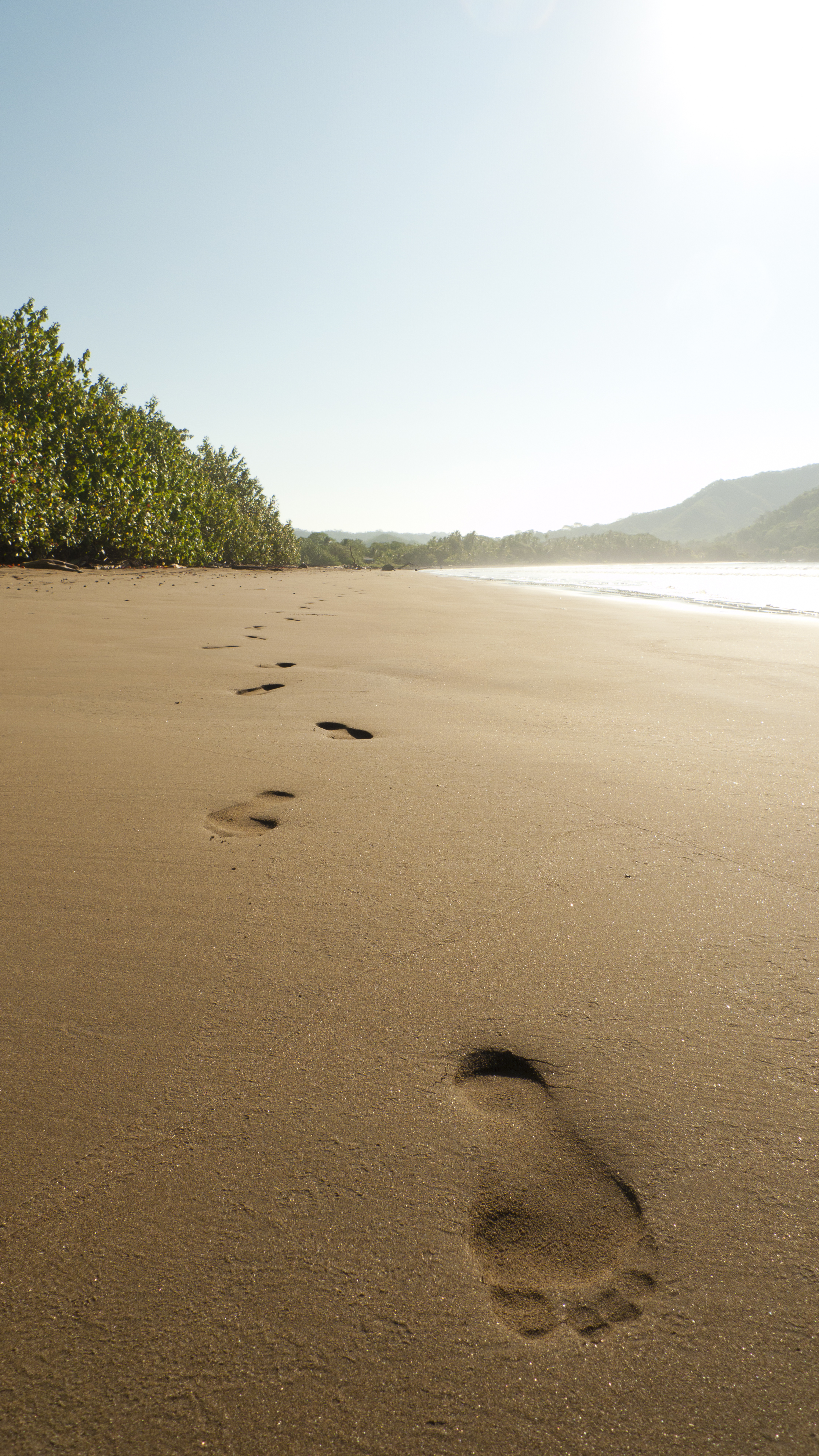 Playa Tambor, Puntarenas, Costa Rica.